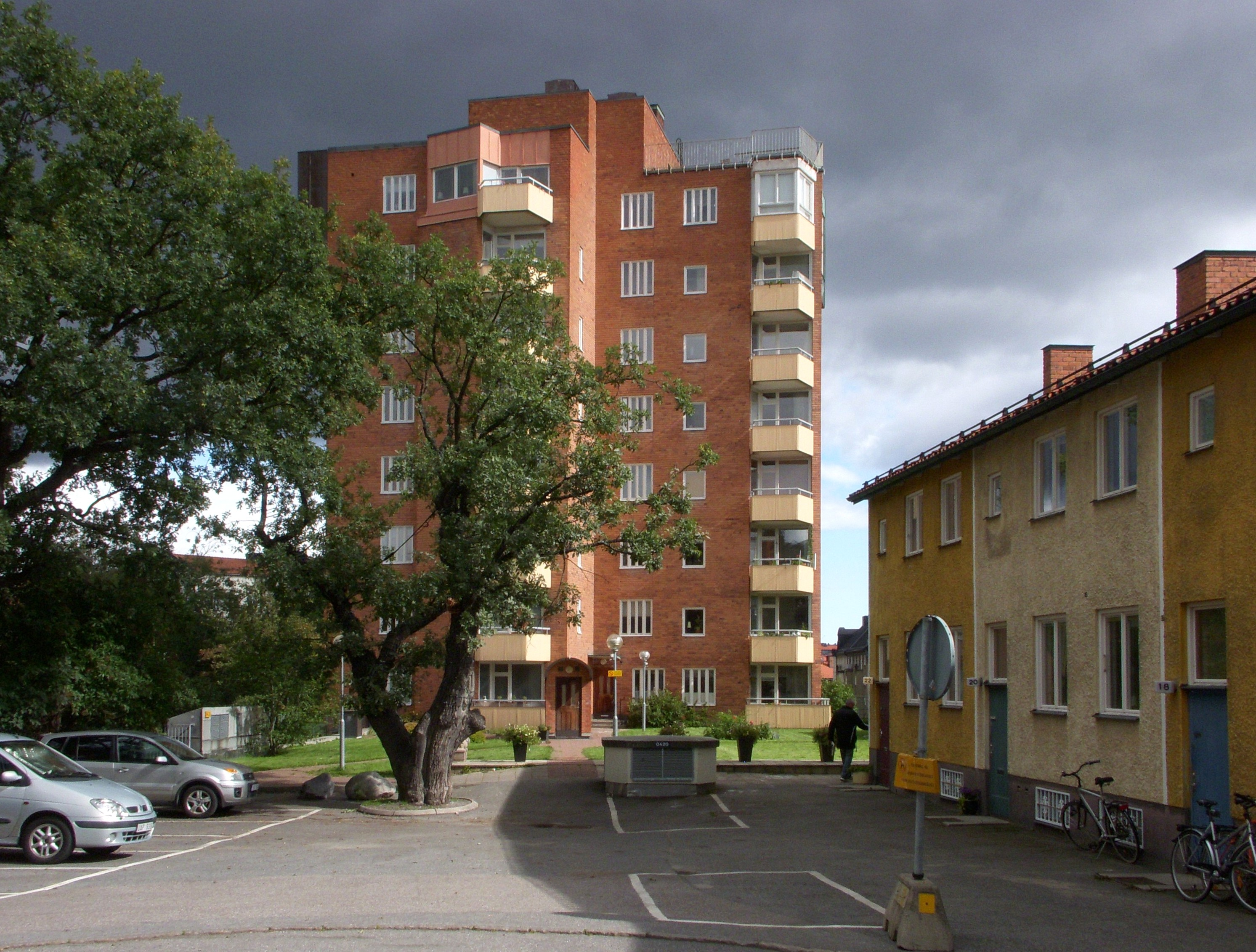 Det så kallade "Galjonshuset" i Gröndal